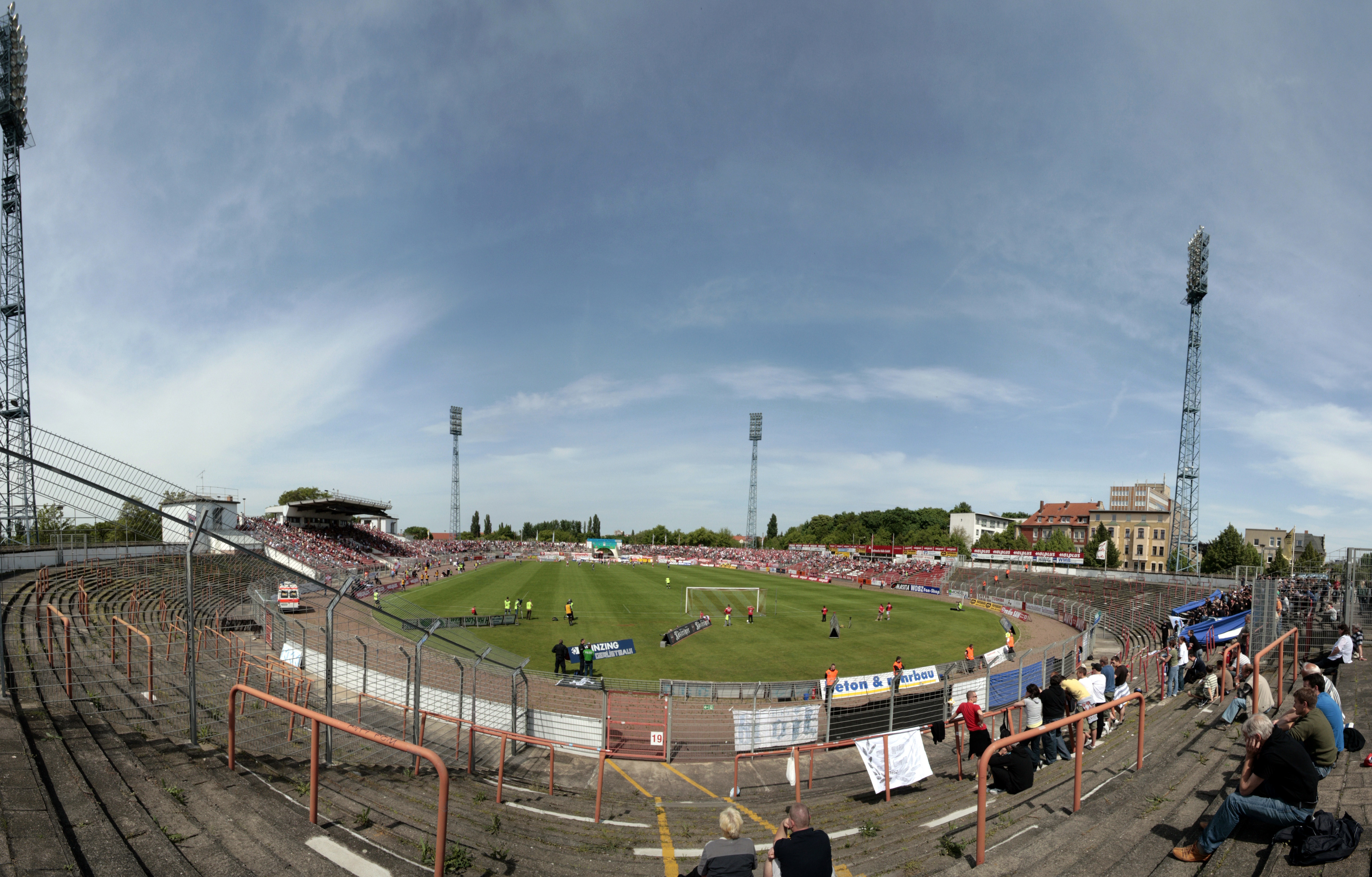 Blick auf´s Stadion beim Spiel Hallescher FC gegen Babelsberg 03 aus Sicht der Gäste